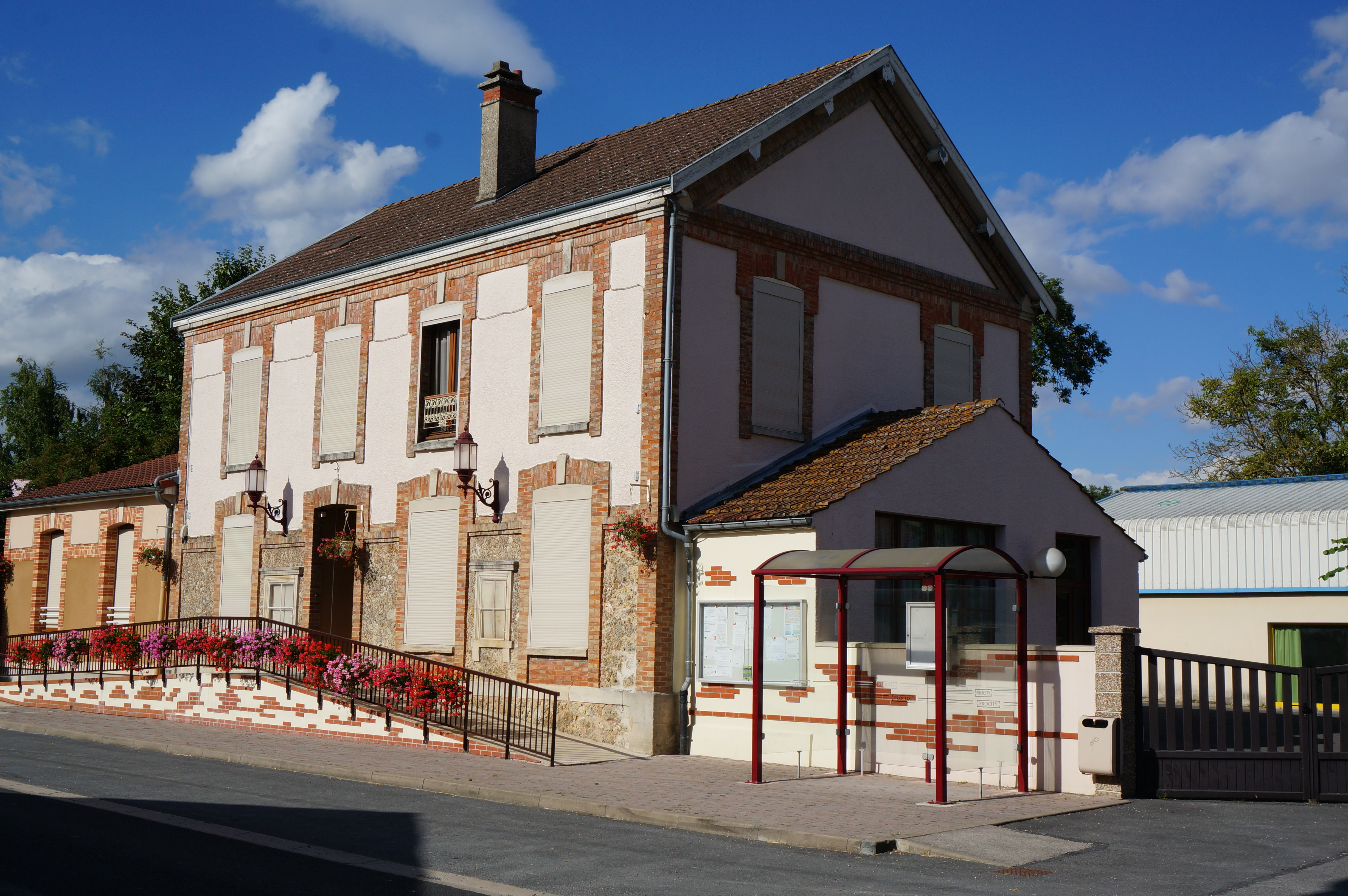 Mairie de Saint-Hilaire-au-Temple.